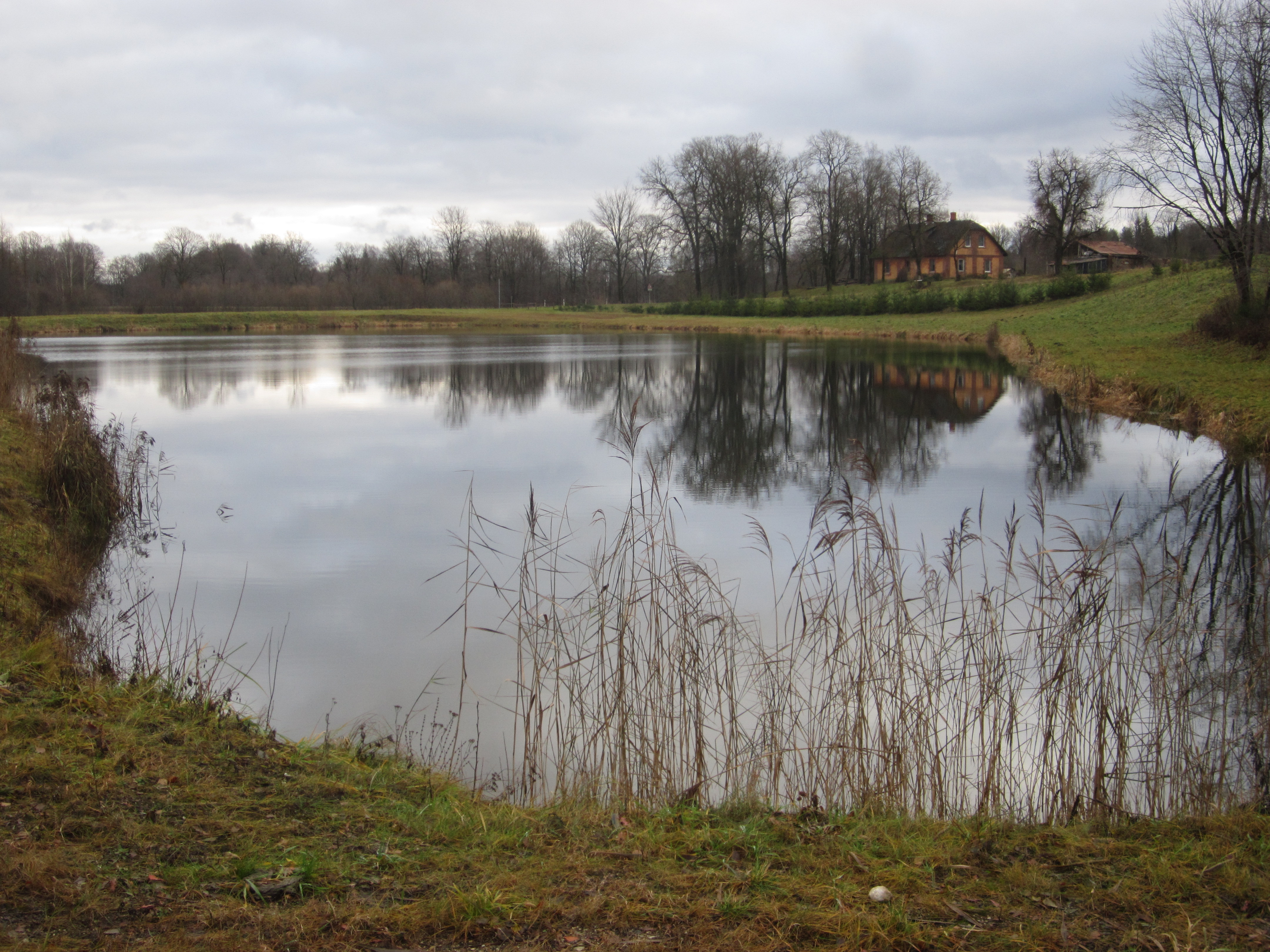 Lielais Liepu dīķis